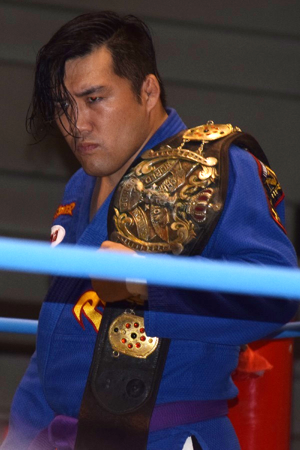 2017年7月30日 大阪府立体育会館・第2競技場 「2017 SUMMER ACTION SERIES」 世界ジュニアヘビー級王座を肩に巻く佐藤光留